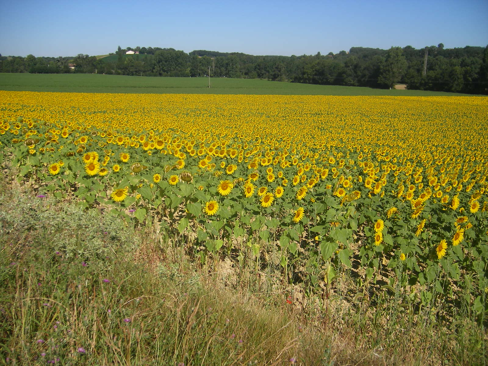 Landscape between Mauvezin and Aubiet